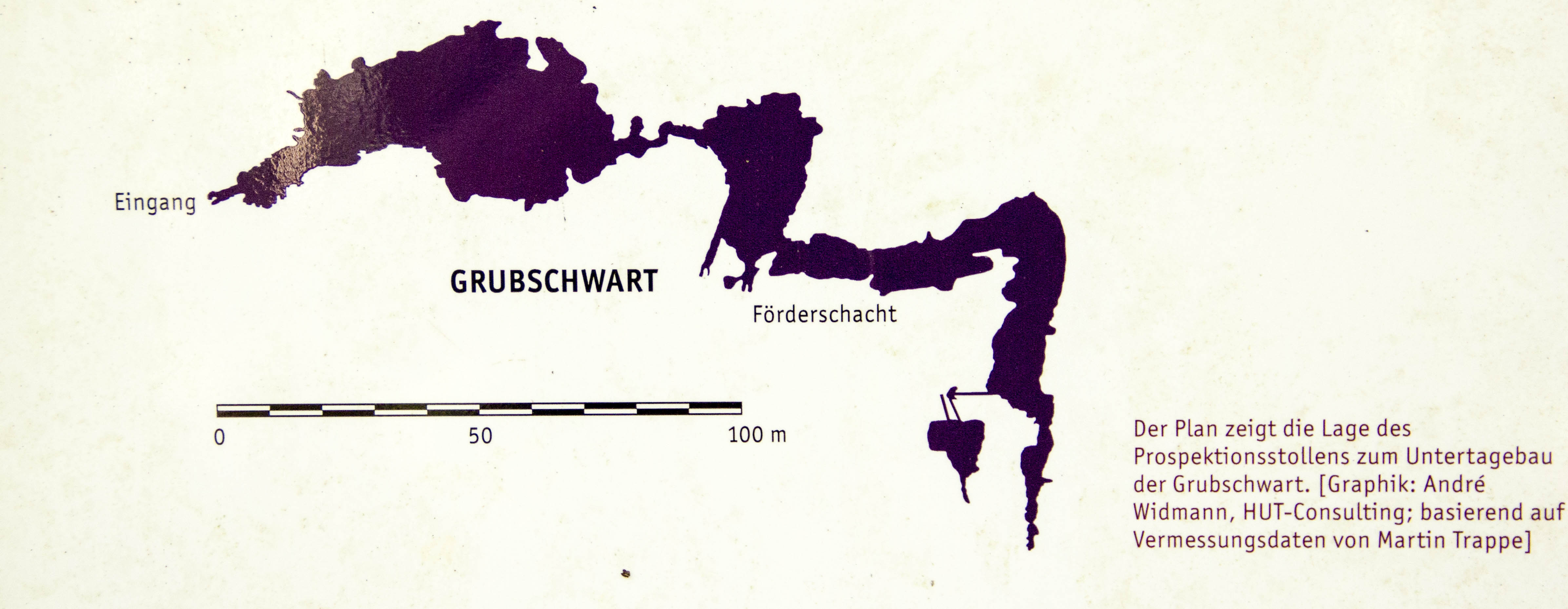 Grubschwart, ehemaliges Bergwerk, Höhle, Stollen, Raitenbucher Forst, Karte der Stollen